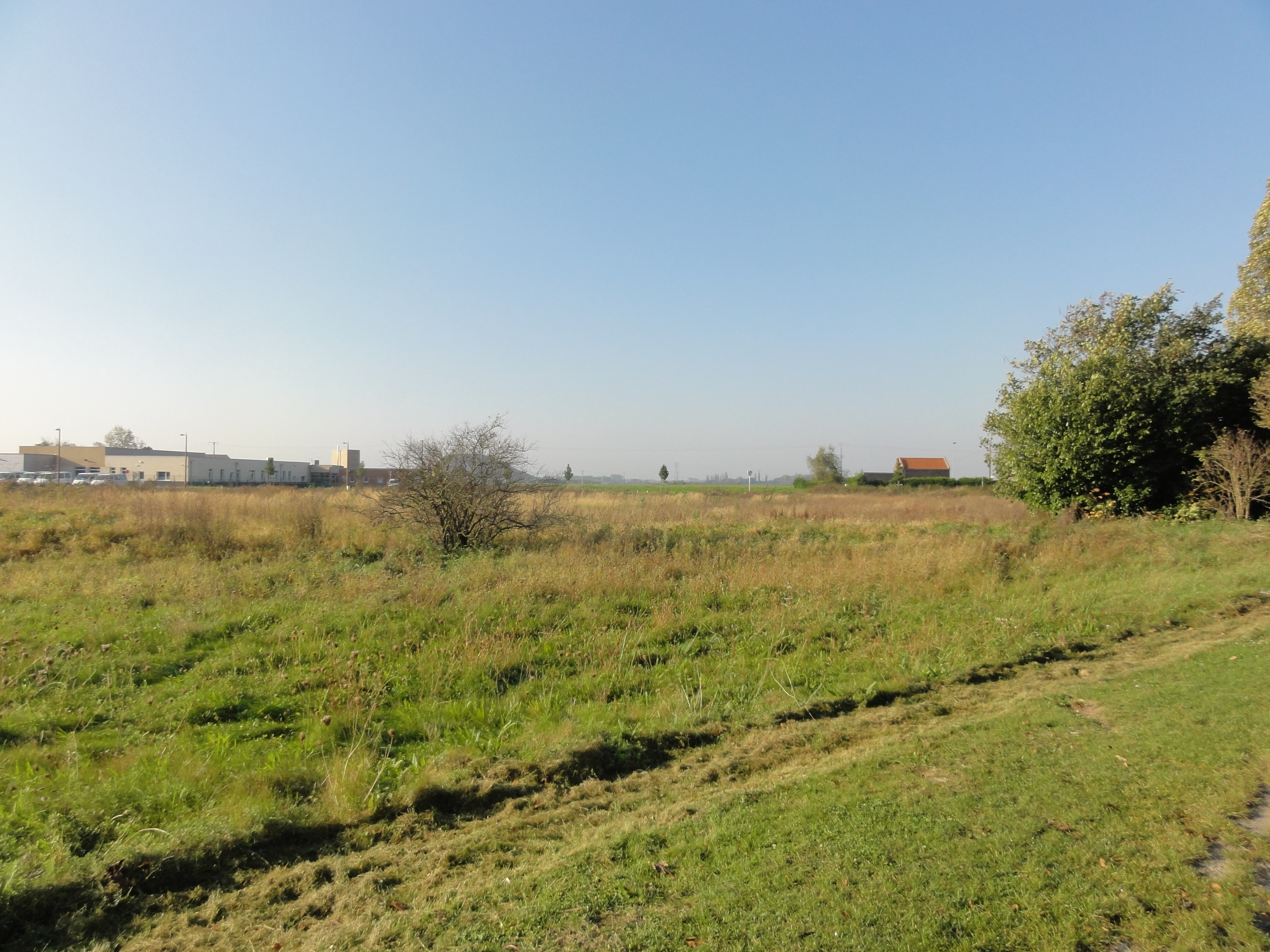 Terril n° 221 dit 12 d'Oignies, disparu, Fosse n° 2 de la Compagnie des mines de Carvin, Carvin, Pas-de-Calais, Nord-Pas-de-Calais, France.